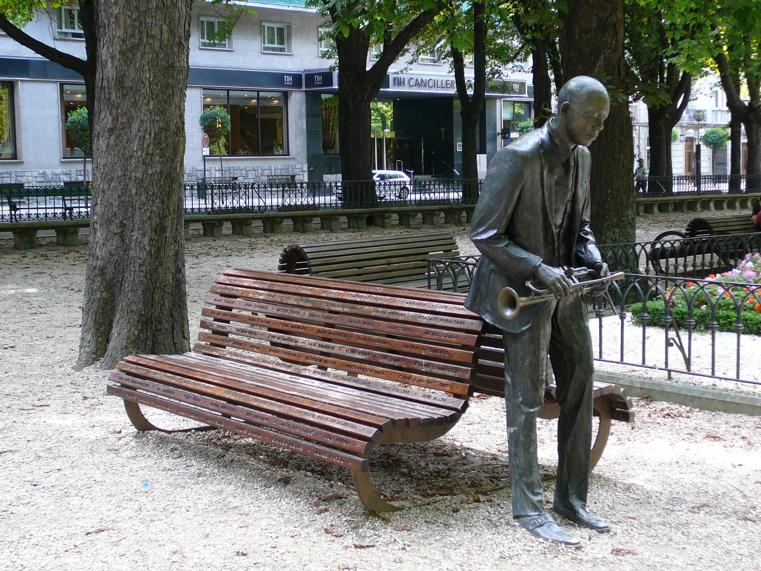 Wynton Marsalis tronpeta-jolearen estatua hau Gasteizko Florida parkean dago eta Marsalisek Gasteizko Jazzaldiari emandako laguntza eskertzeko eraiki zen. Estatuaren atzeko eserlekuan hainbat jazz-musikari ospetsuren izenak daude grabatuta, den-denak Gasteizko Jazzaldian egondakoak.